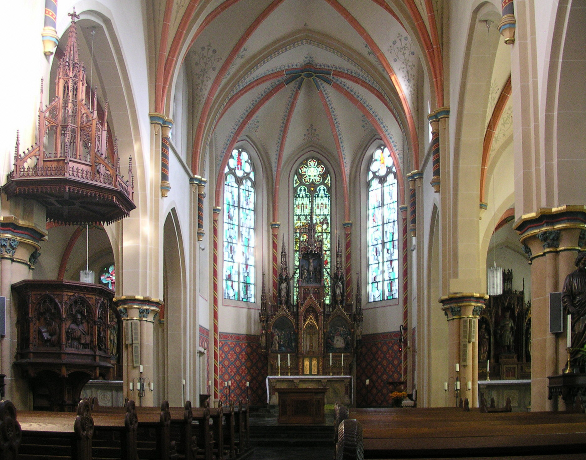 Würselen-Broichweiden, römisch-katholische Pfarrkirche St. Nikolaus